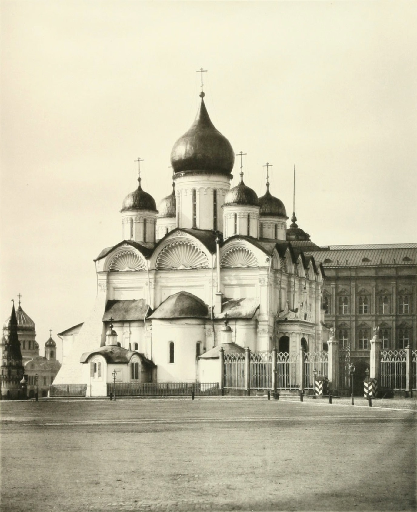 Восточный фасад Архангельского собора с наружными приделами: слева – Третьего обретения главы Иоанна Предтечи; справа – Покрова Богородицы (с 1848 г. – придел Мученика Уара). 1880-е гг.